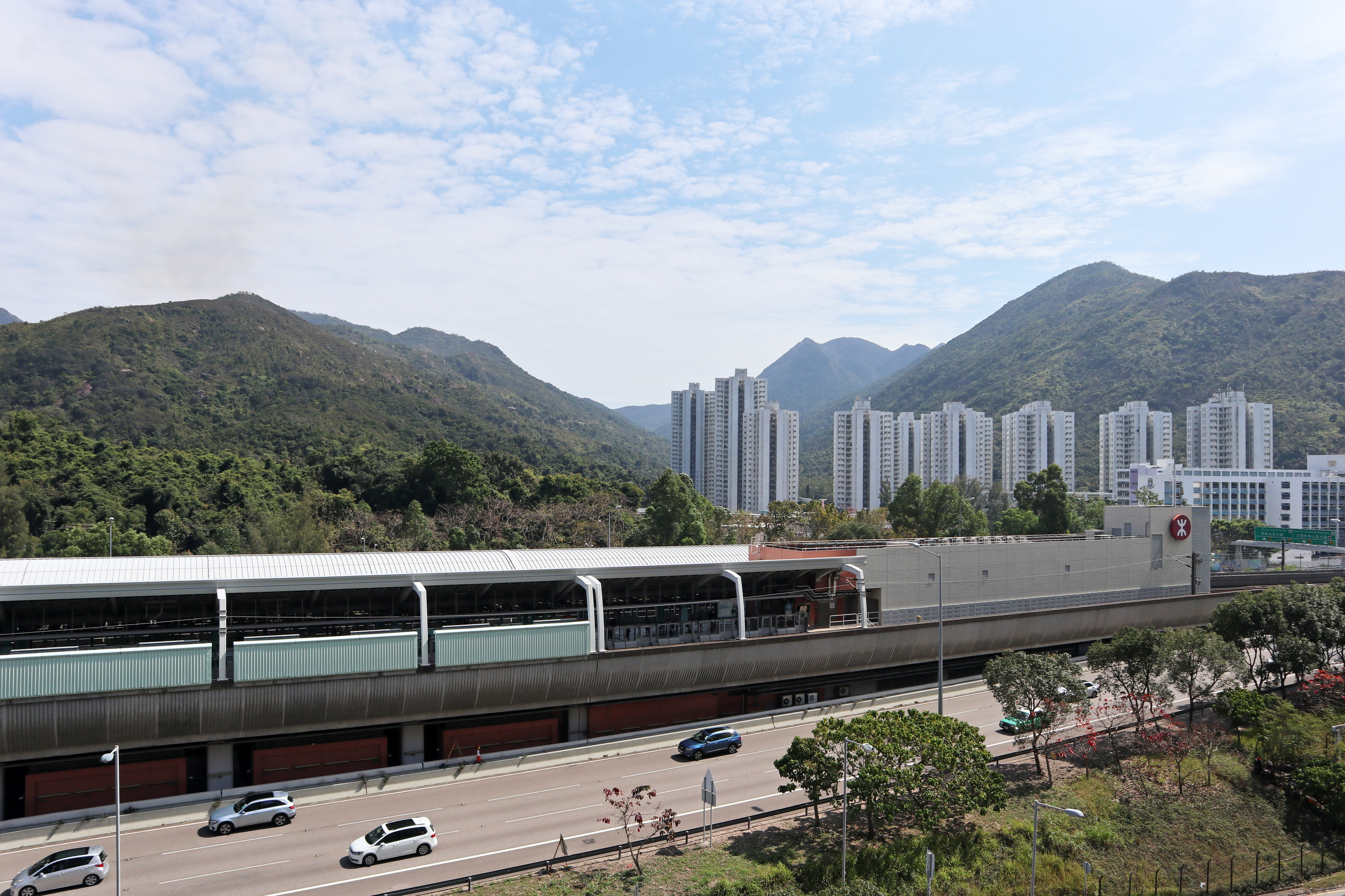 港鐵大水坑站外觀